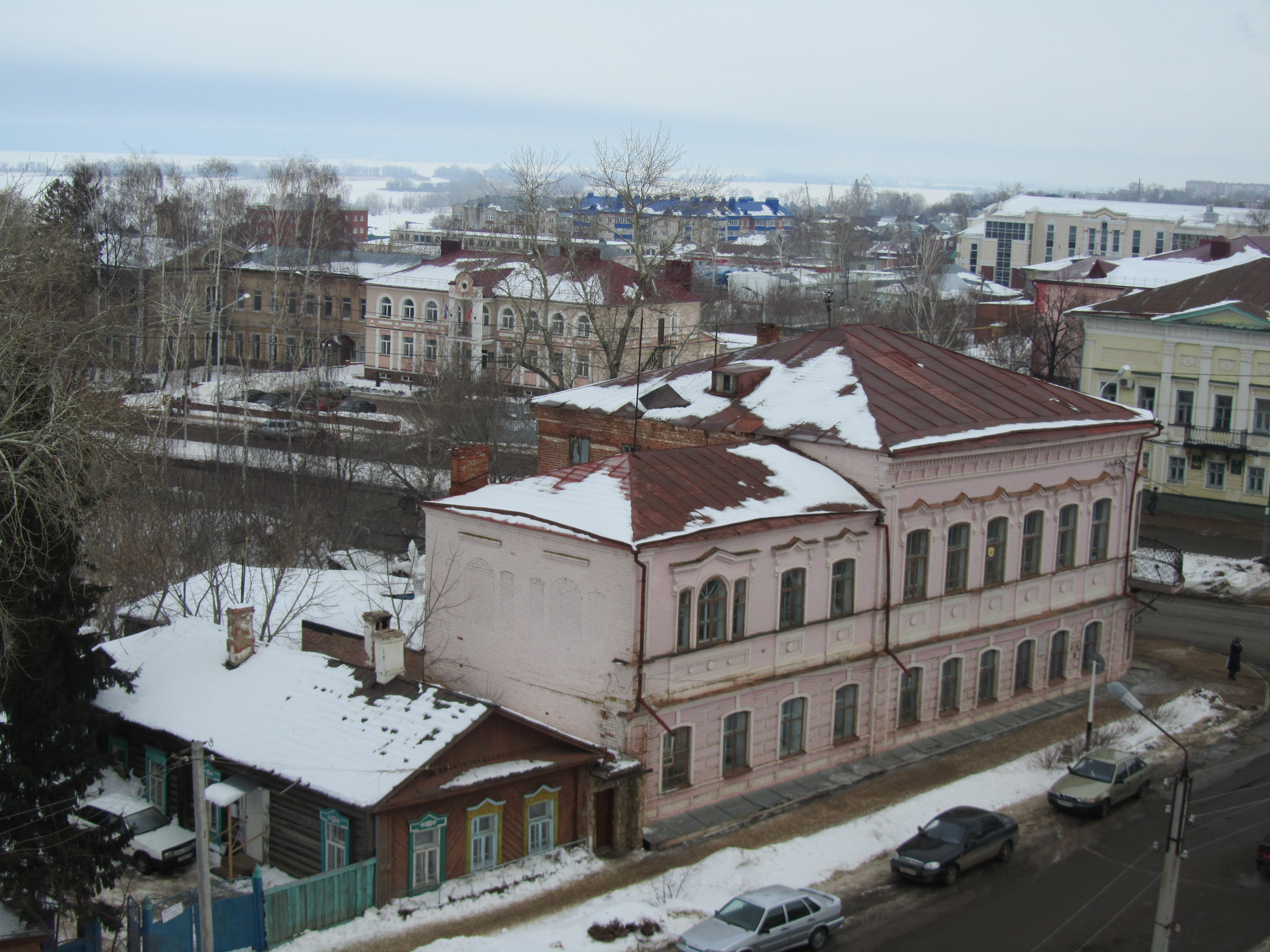 Дом учителя. Чистополь. Февраль 2013